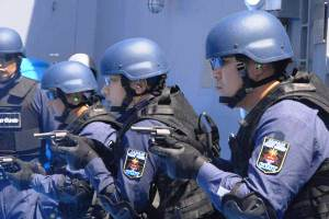 派遣海賊対処行動水上部隊（12次隊）での小火器射撃訓練（海上保安庁・ニューナンブ）。